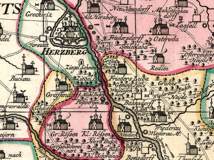 Ausschnitt aus Die Ämter Liebenwerda und Schlieben im 18. Jahrhundert